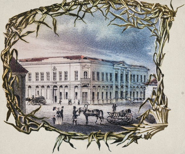 Narva gümnaasiumi hoone